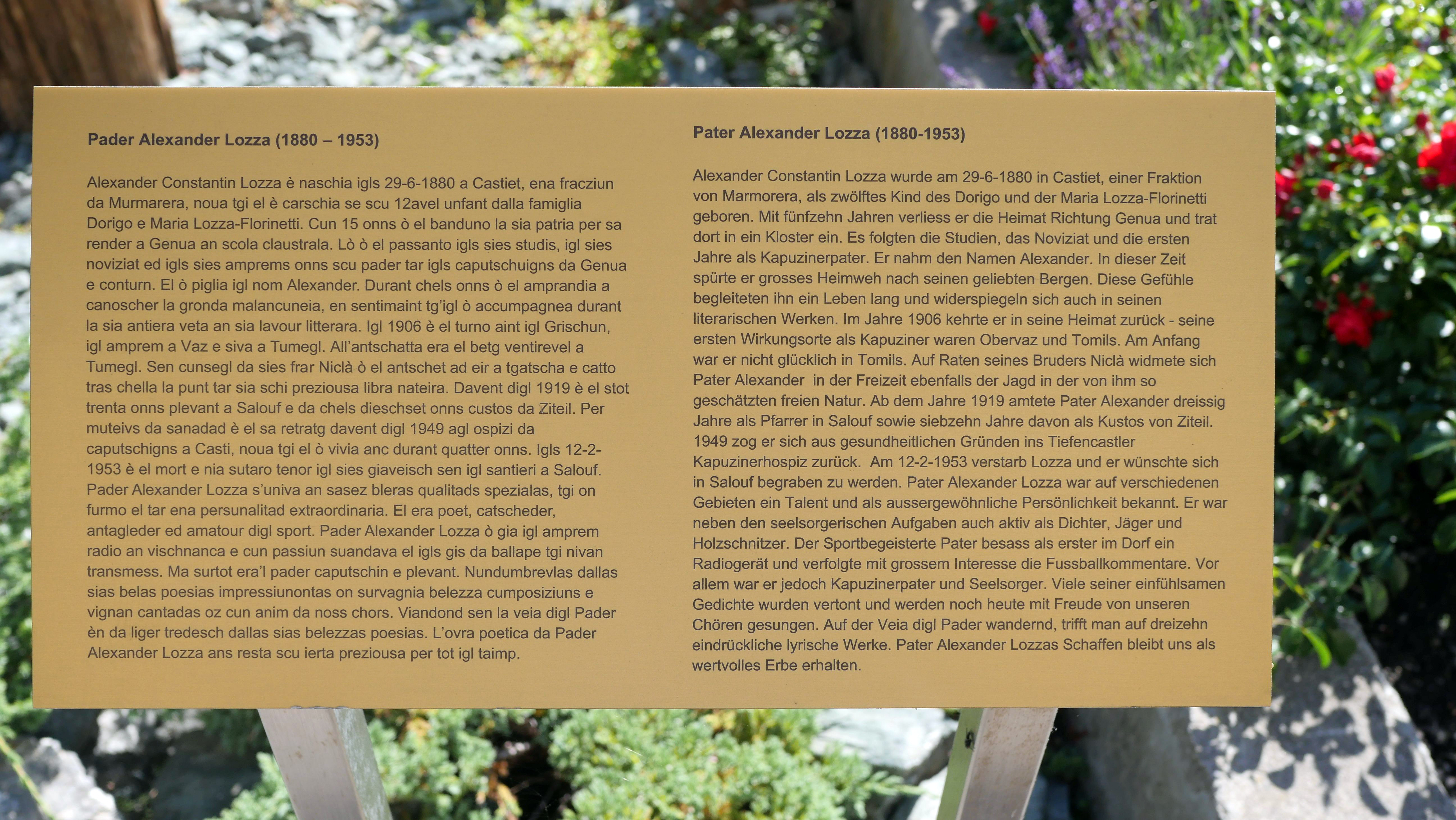 Gedenktafel für Pater Alexander Lozza (1880 - 1952) vor dem Kapuzinerhospiz in Salouf.